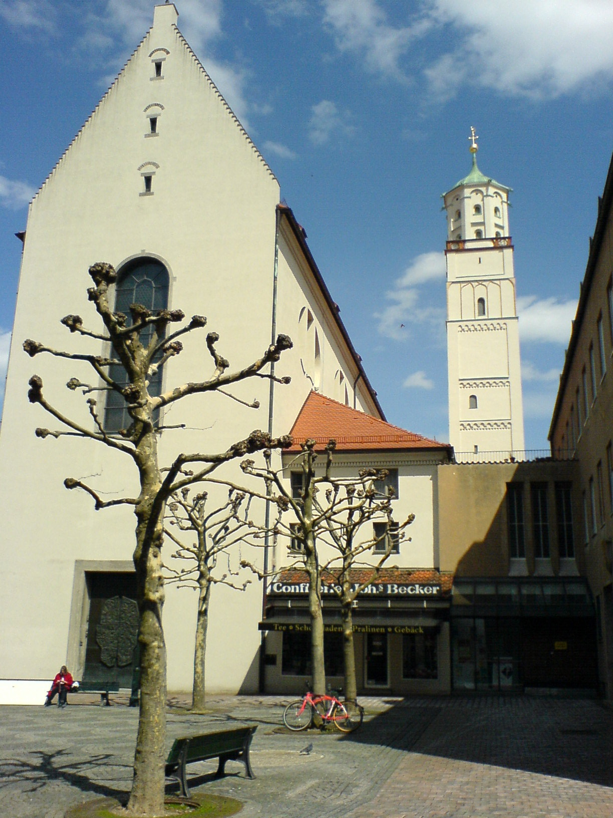 St.-Moritz-Kirche in Augsburg aus Sicht des Moritzplatzes.